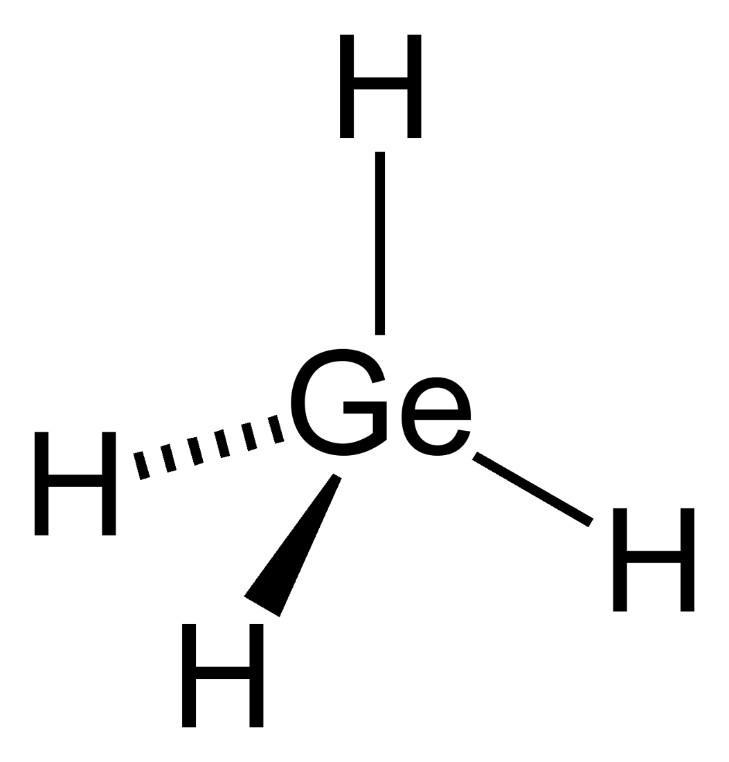 Structural formula of germane, GeH4